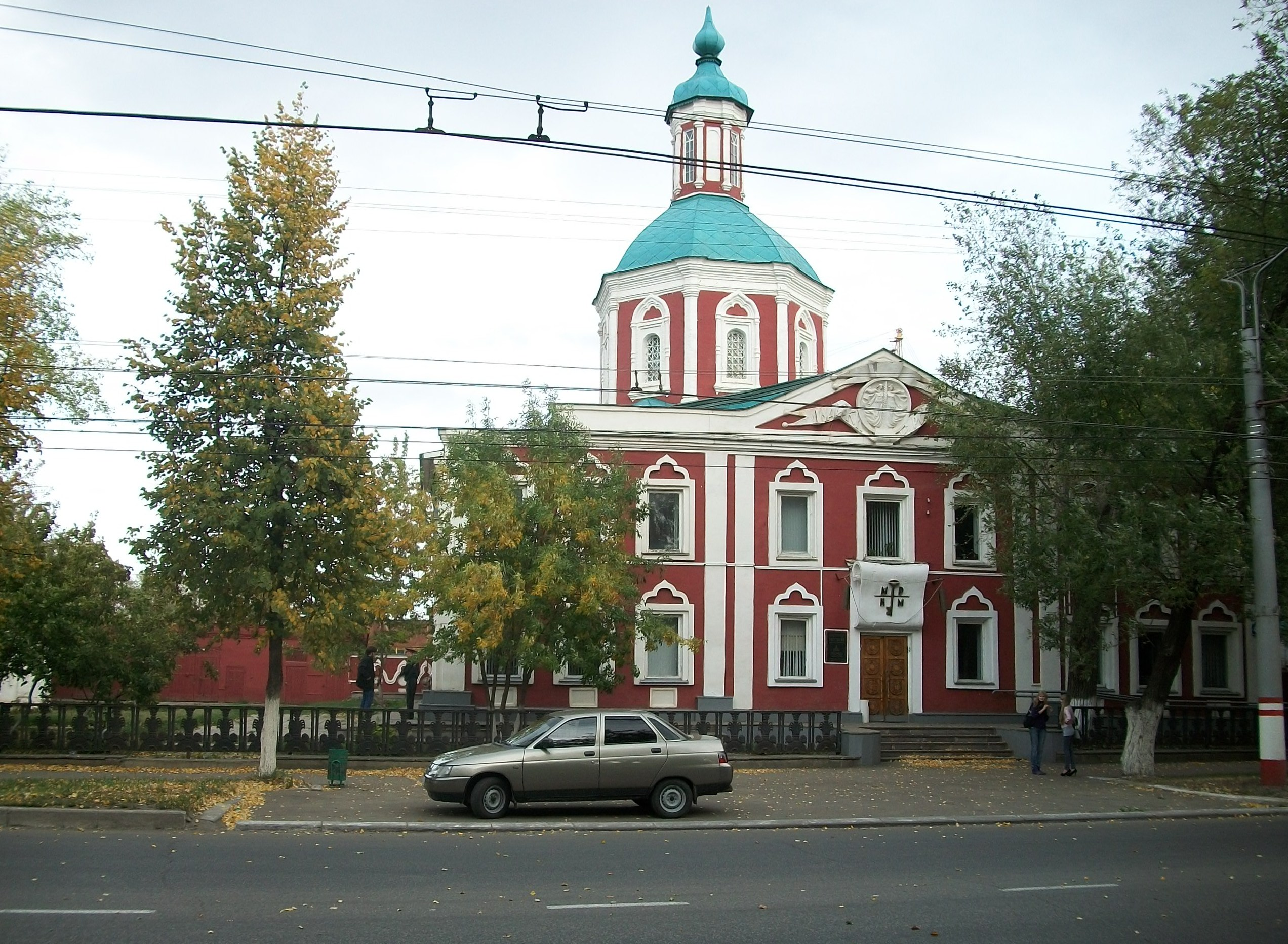 Мордовский республиканский объединенный краеведческий музей в Саранске.